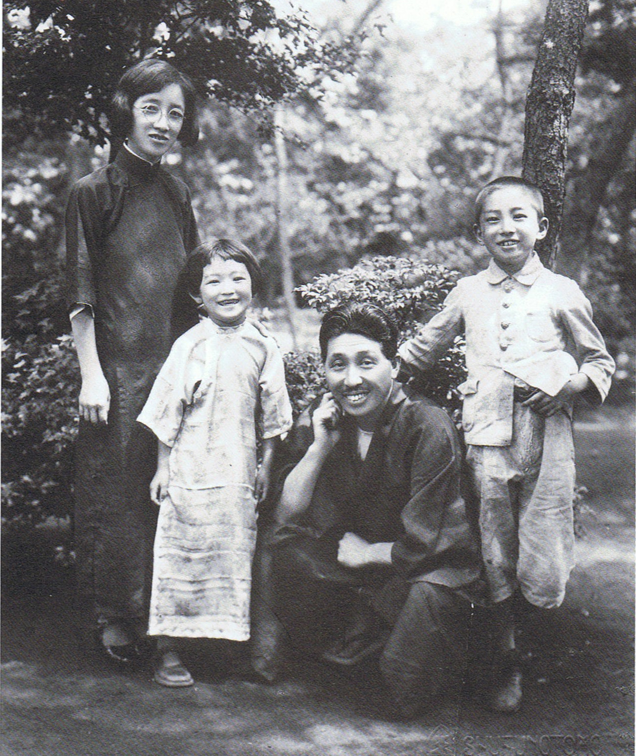 昭和5年、宮崎燁子（柳原白蓮）、長女・蕗苳、宮崎龍介、長男・香織